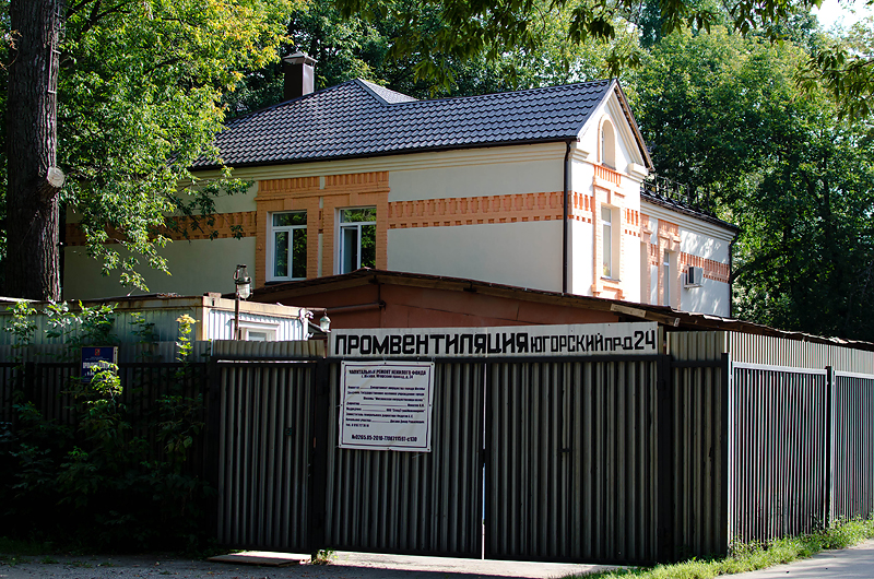 Проезд Югорский, Москва Дом №24